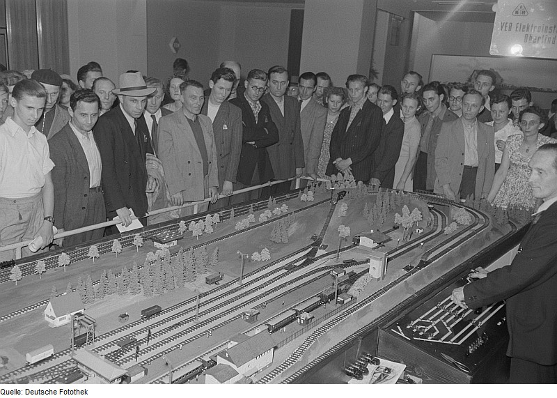 Original image description from the Deutsche Fotothek Besucher an einer PIKO Modelleisenbahnanlage der VEB Elektroinstallation Oberlind, Herbstmesse 1953